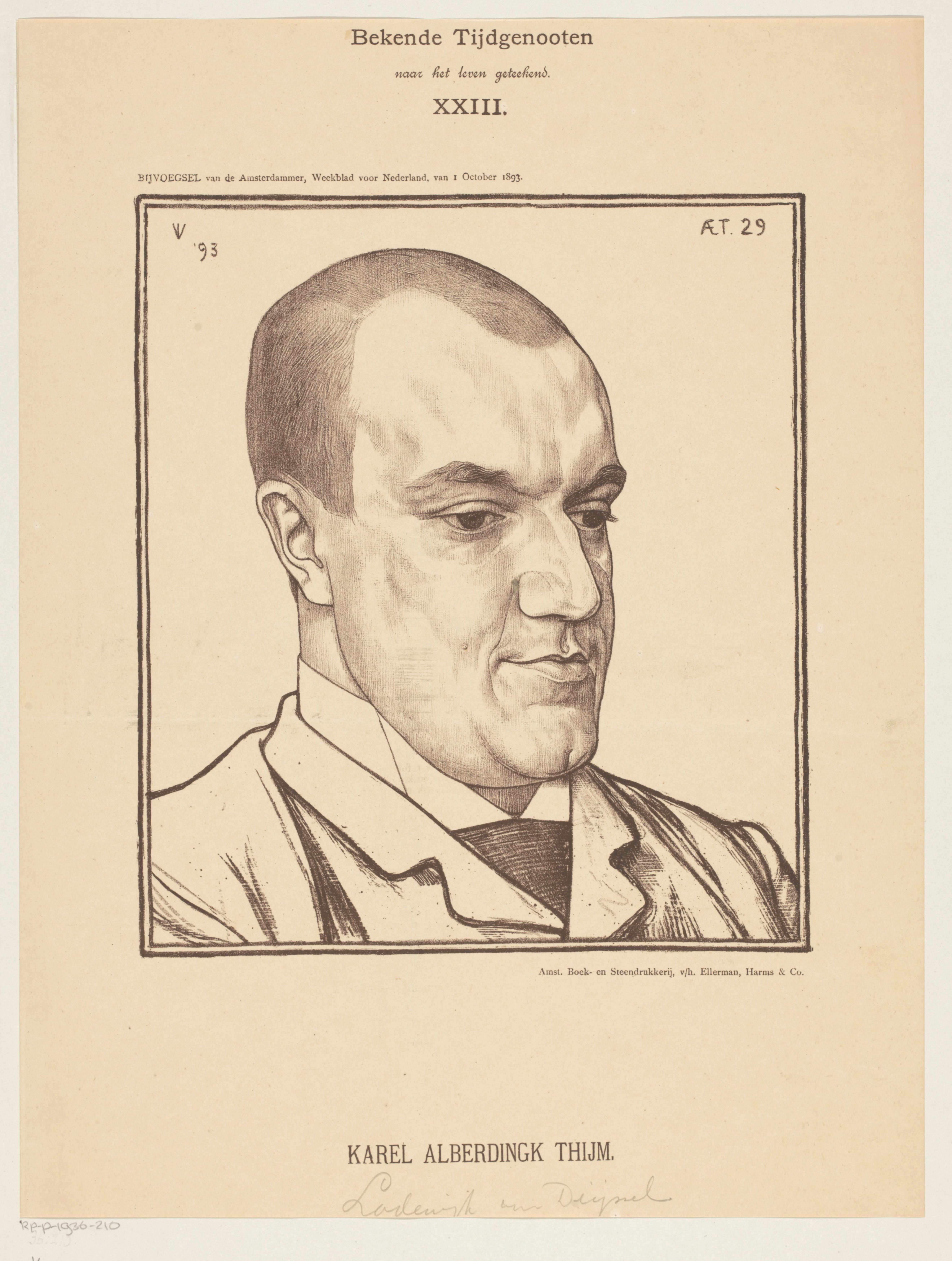 IdentificatieTitel(s): Portret van Lodewijk van Deyssel op 29-jarige leeftijdObjecttype: prent boekillustratie Objectnummer: RP-P-1936-210Opschriften / Merken: verzamelaarsmerk, verso, gestempeld: Lugt 2228Omschrijving: Portret van Lodewijk van Deyssel in een rechthoekige omlijsting. Rechtsboven zijn leeftijd. In de bovenmarge drie regels Nederlandse tekst. In de ondermarge zijn naam.VervaardigingVervaardiger: prentmaker: Jan Veth (vermeld op object)drukker: Ellerman Harms & Co. (vermeld op object)uitgever: Ellerman Harms & Co. (vermeld op object)Plaats vervaardiging: prentmaker: Nederlanddrukker: Amsterdamuitgever: AmsterdamDatering: 1-okt-1893Fysieke kenmerken: lithografie en tekst in boekdrukMateriaal: papier Techniek: lithografie (techniek) / boekdrukAfmetingen: blad: h 337 mm × b 255 mmToelichtingPrent uit: De Amsterdammer. 1 oktober 1893.OnderwerpWie: Lodewijk van DeysselVerwerving en rechtenCredit line: Schenking van H.P. Baard, AmsterdamVerwerving: schenking 1936Copyright: Publiek domein